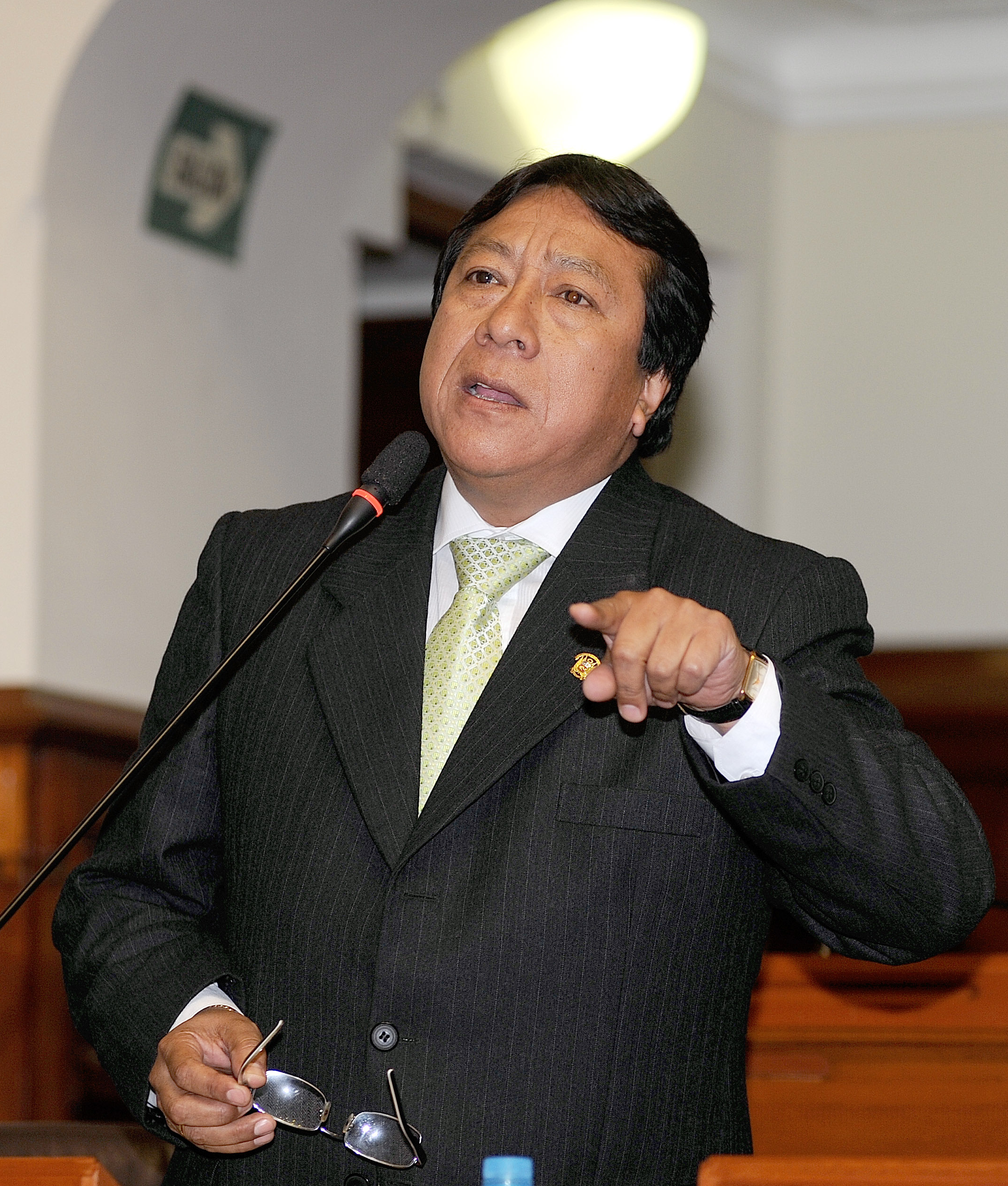 El congresista Julio Herrera fija su posición en el debate parlamentario realizado esta mañana por el Pleno.